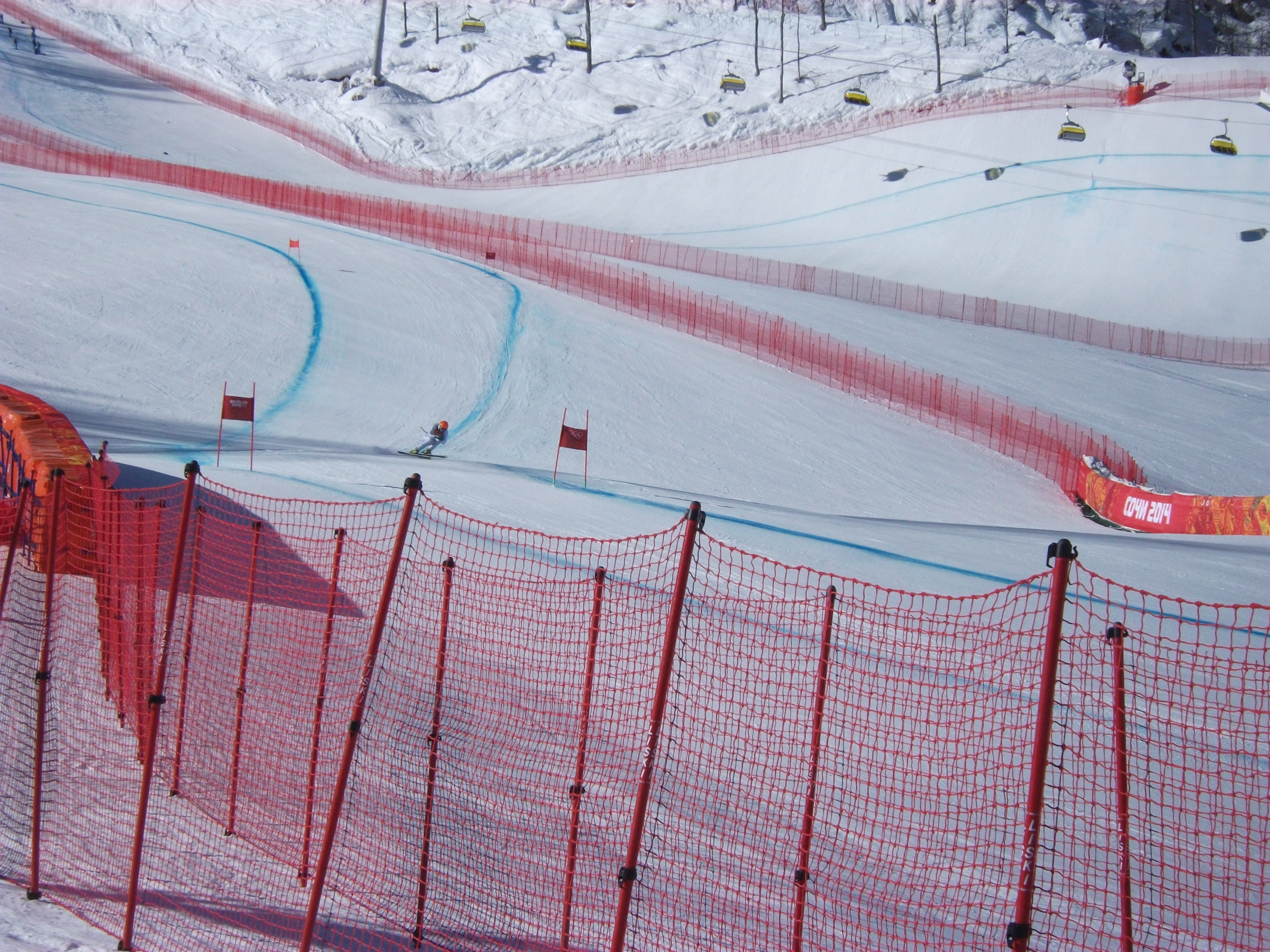 На трассе скоростного спуска Роза Хутор во время Зимних олимпийских игр